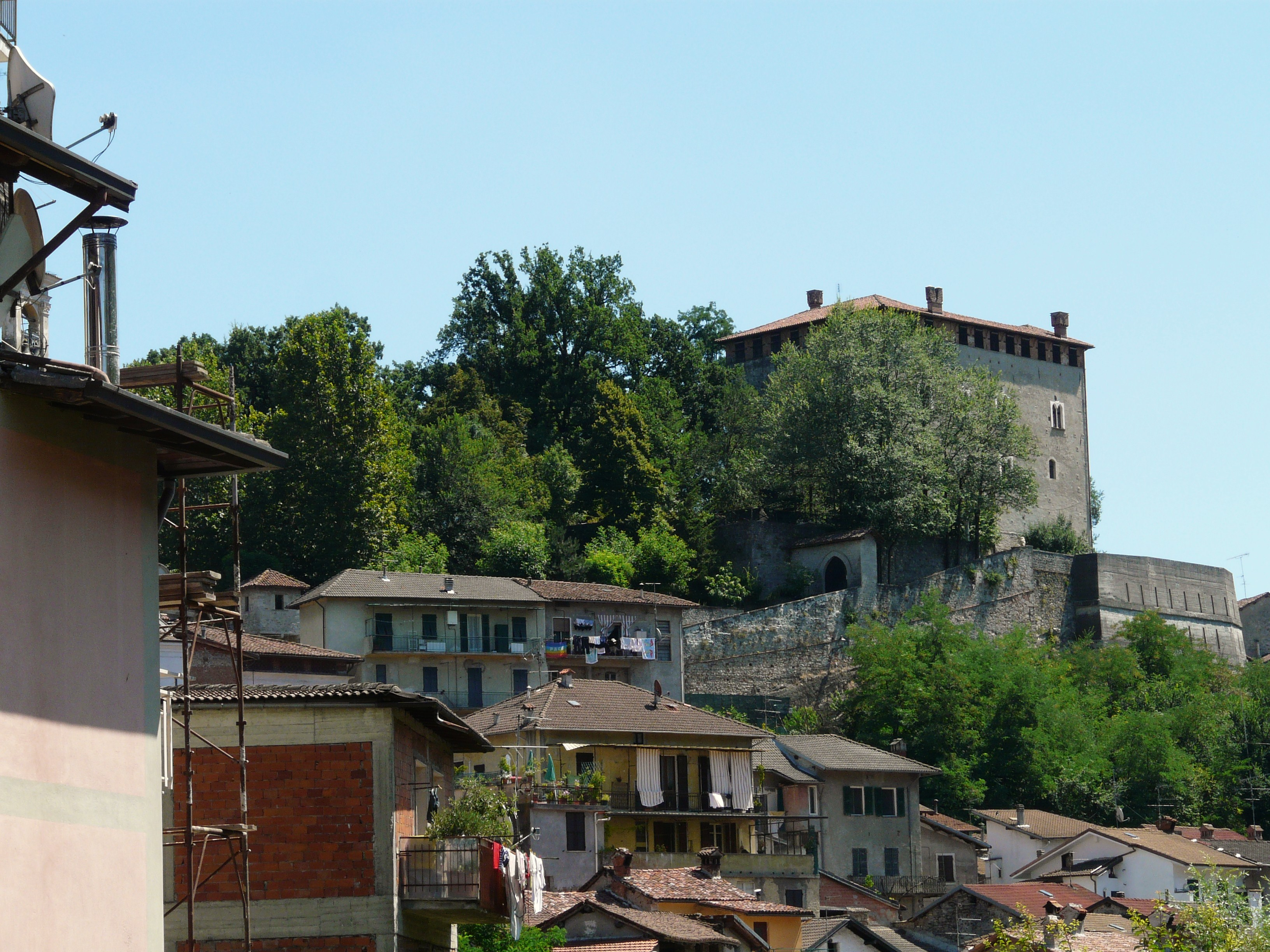 Castello di Castelletto d'Orba, Piemonte, Italia